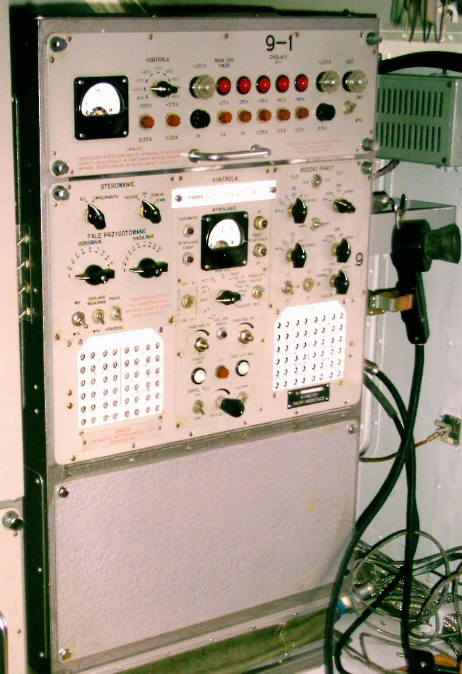 Pulpit radiostacji jednowstęgowej UKF R-137. W jego dolnej części widoczne miejsce na umieszczenie panelu wykonawczego zdalnego sterowania - PWZS. Zdjęcie pochodzi ze strony